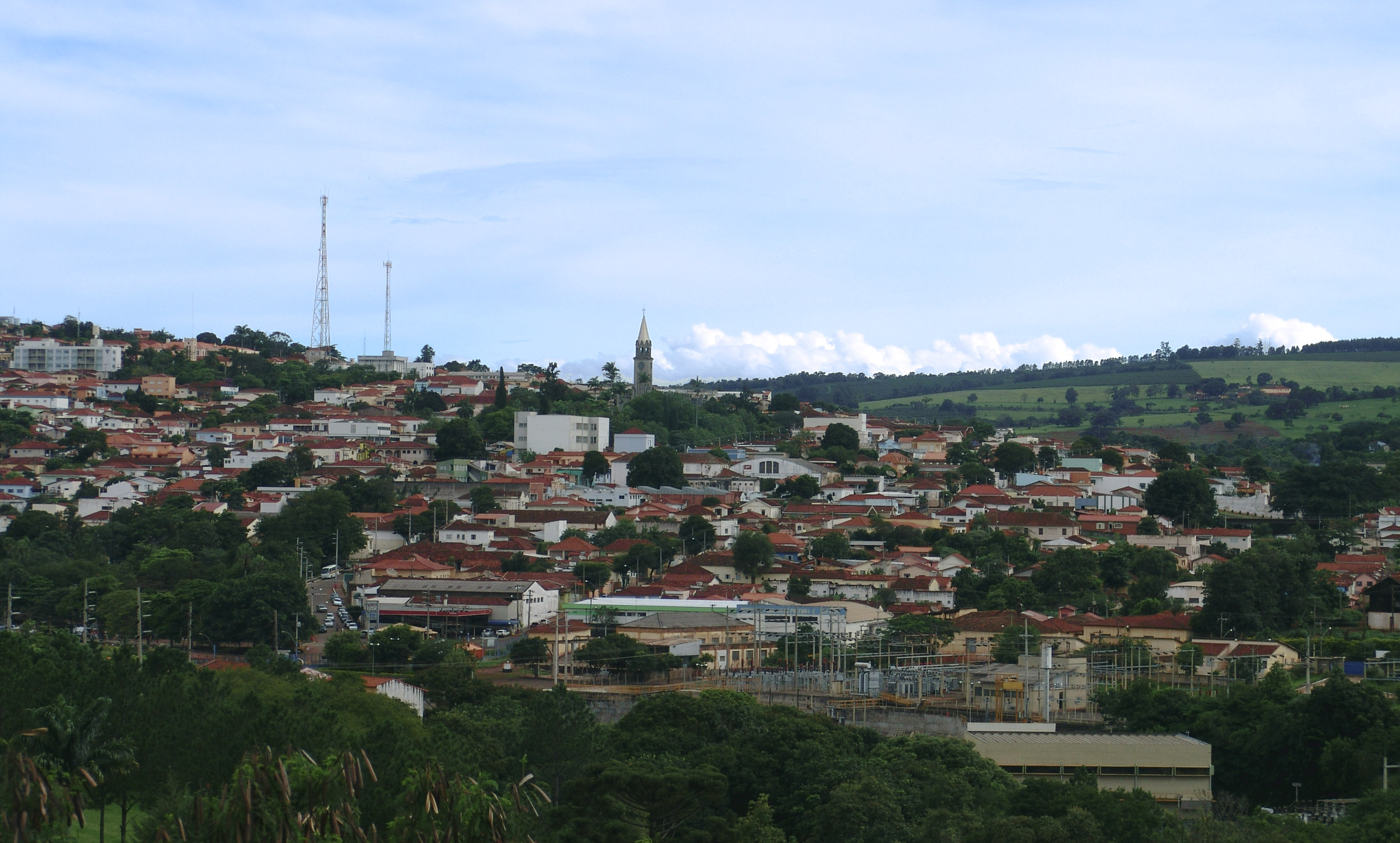 Vista parcial da cidade de Piraju, São Paulo, Brasil